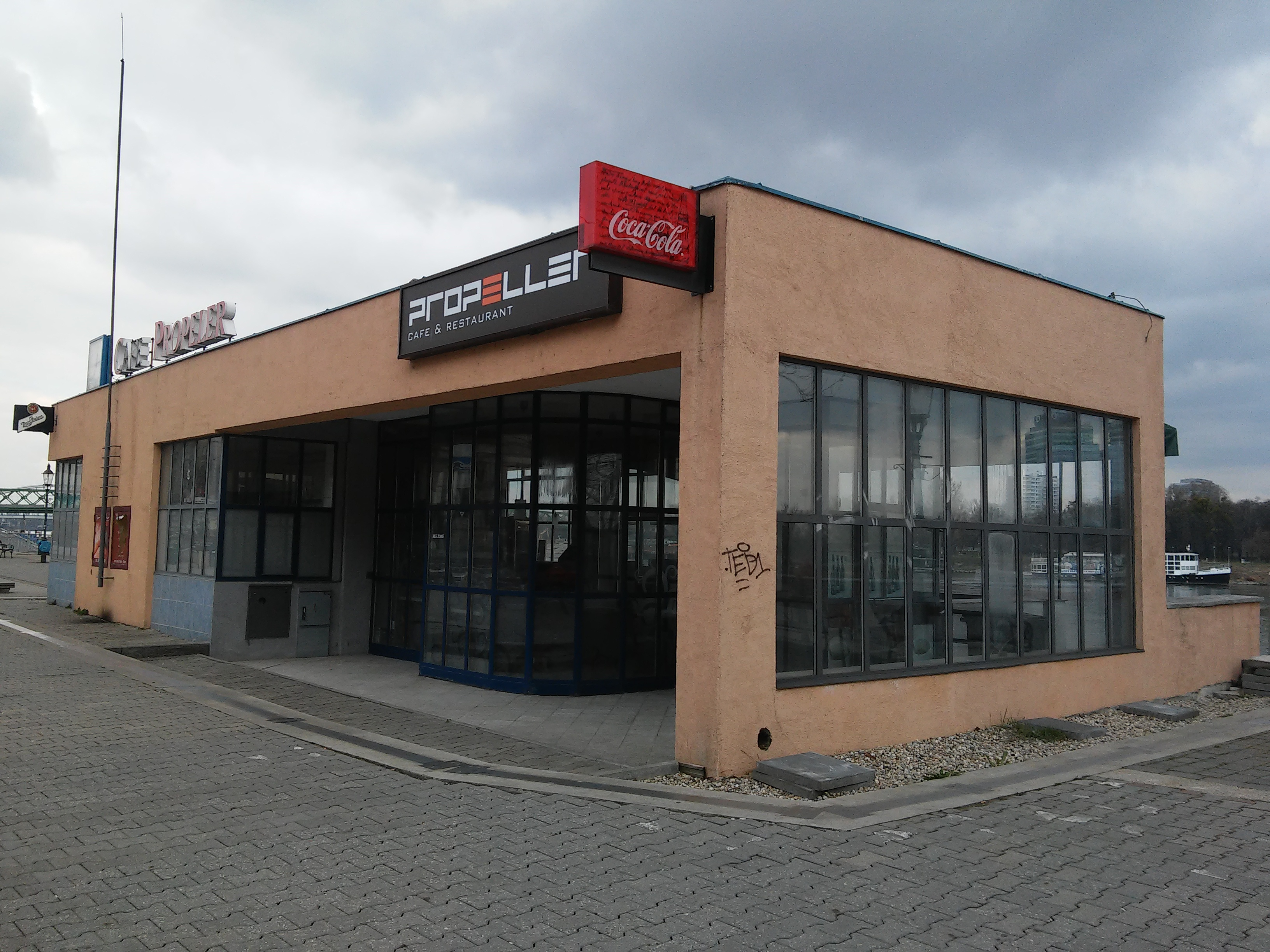 Propeller, funkcionalistická budova v Bratislave